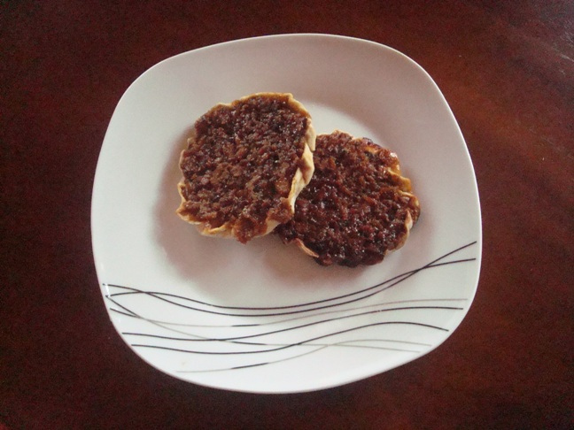 Tártara, torreja o cocada, postre típico costarricense.